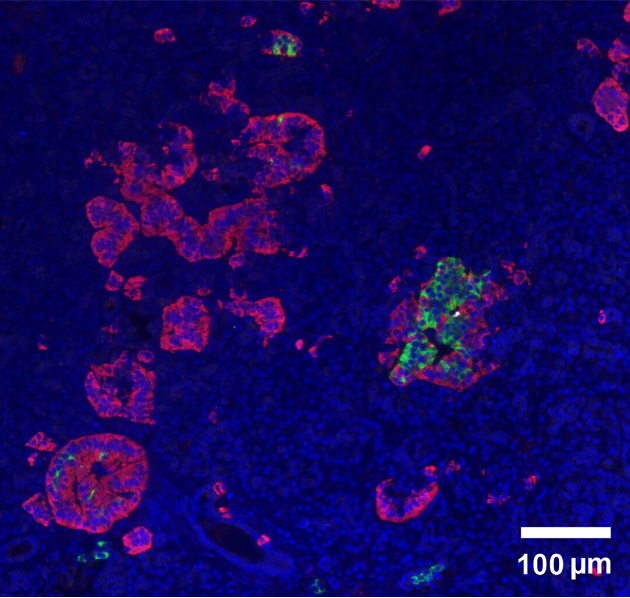 Figura 3 B a. Análisis en muestras múltiples. Vista representativa de los islotes en el área rica en células PP. Inmunohistoquímica: Polipéptido pancreático en rojo, insulina en verde, glucagón en blanco y núcleos en azul).